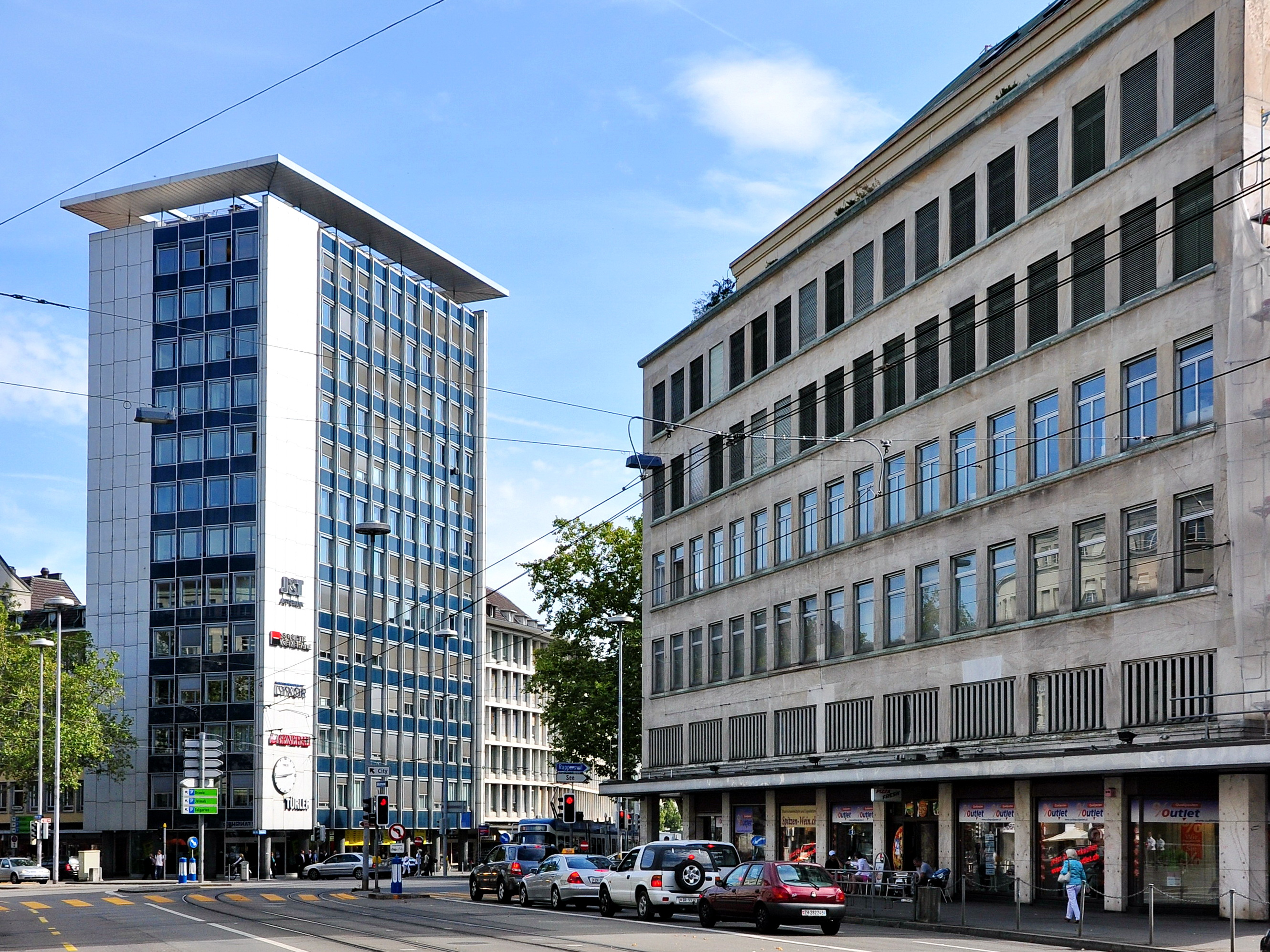 Sihlporte in Zürich-City (Switzerland)